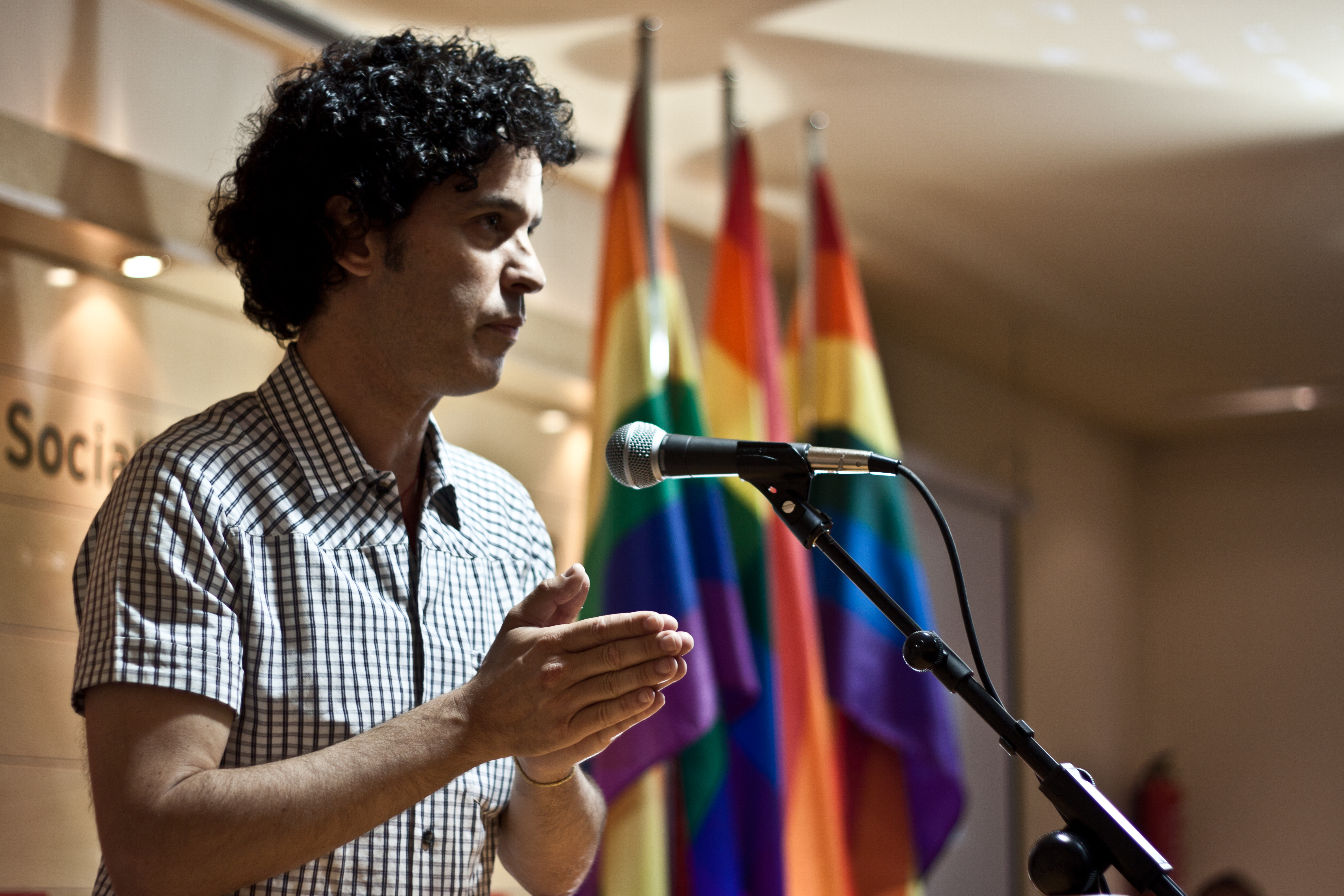 Pedro Zerolo en la sede del PSOE del distrito Centro de Madrid